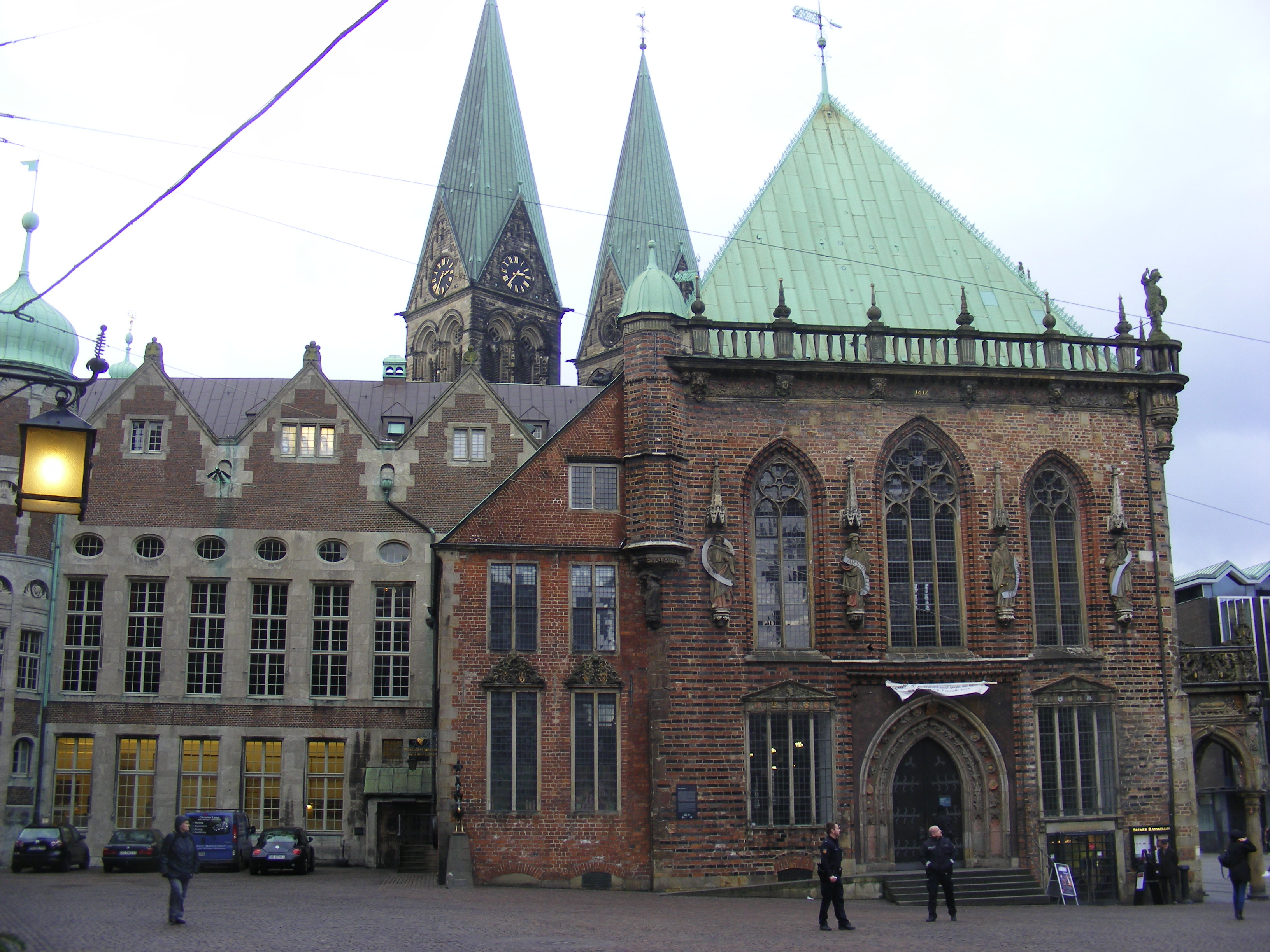 Das Bremer Rathaus vom Kirchhof Unser Lieben Frauen im Nordwesten gesehen, von rechts nach links: Arkade zum Markt, Schmalseite des Hauptgebäudes (sog. Alten Rathauses), Kanzleianbau von 1682/83, Erweiterungsbau von 1909/10 (sog. Neues Rathaus)